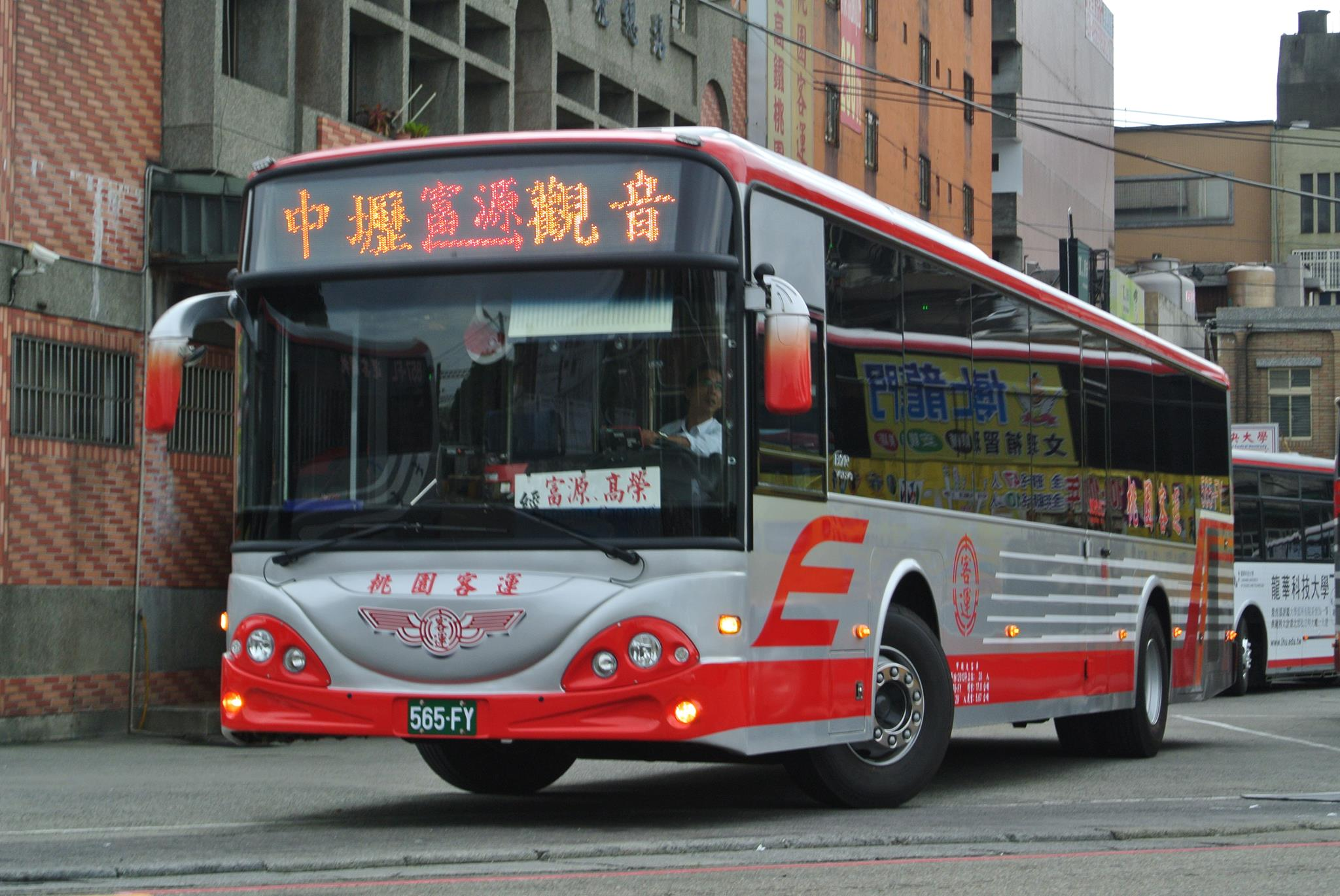 桃園客運大吉車體Volvo B7RLE低底盤公車565-FY